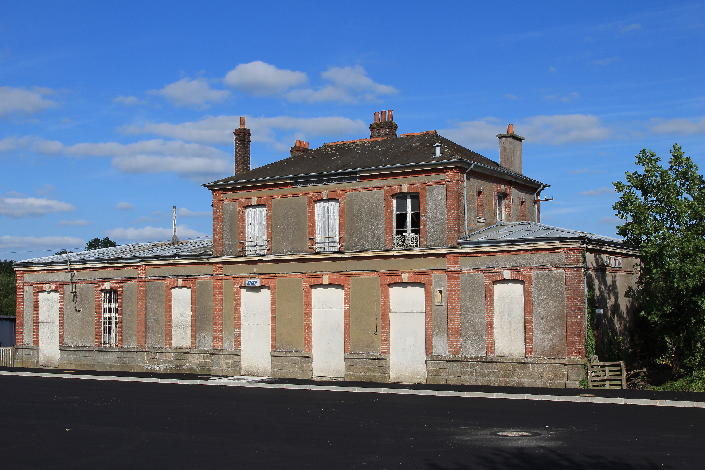 L'ancien bâtiment voyageurs de la gare de Quintin, vu côté cour.